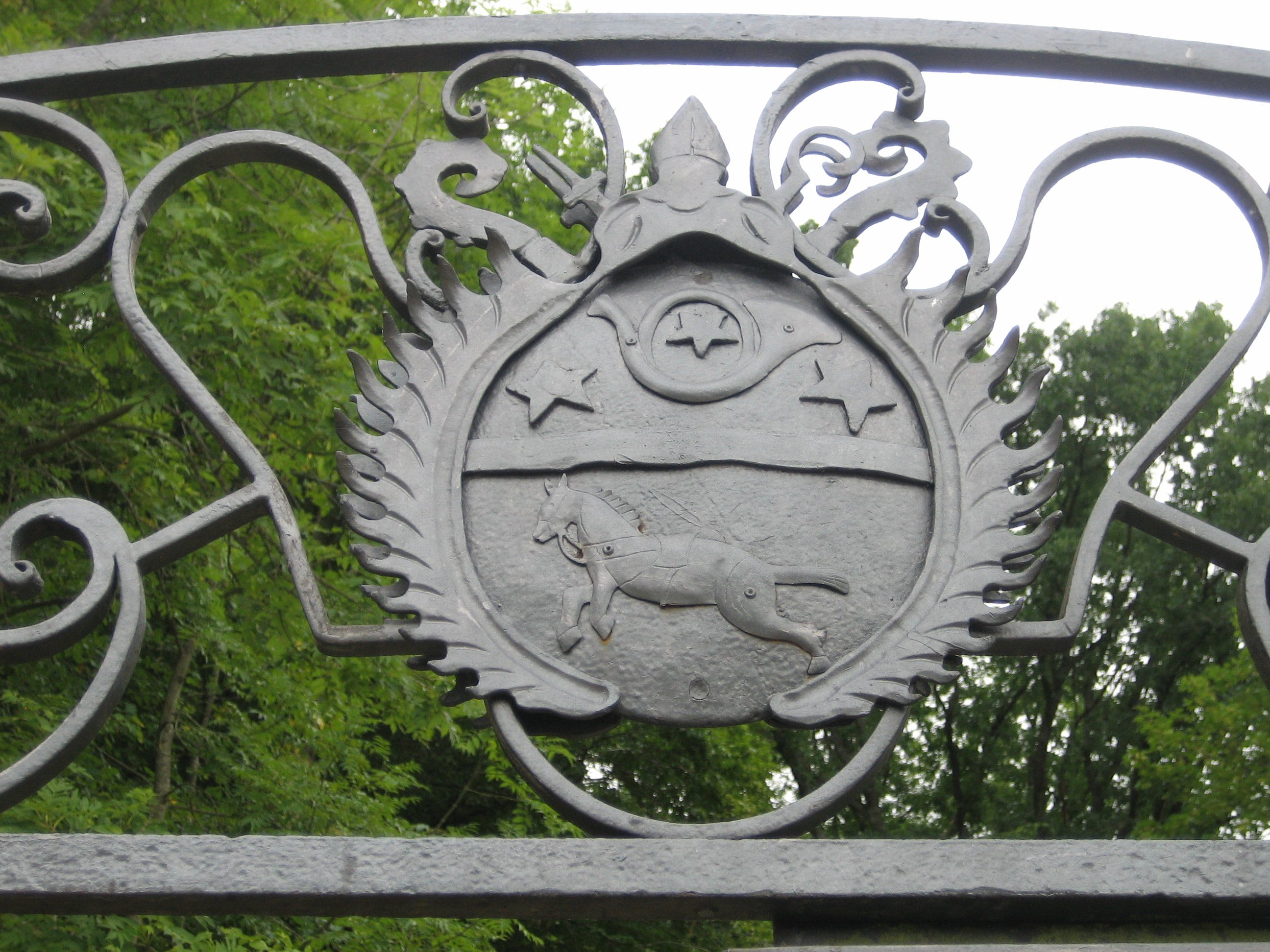 Wappen von Emmanuel Limpach, Abt der Abtei Echternach, an einem Tor im Garten des Schlosses Weilerbach/Eifel